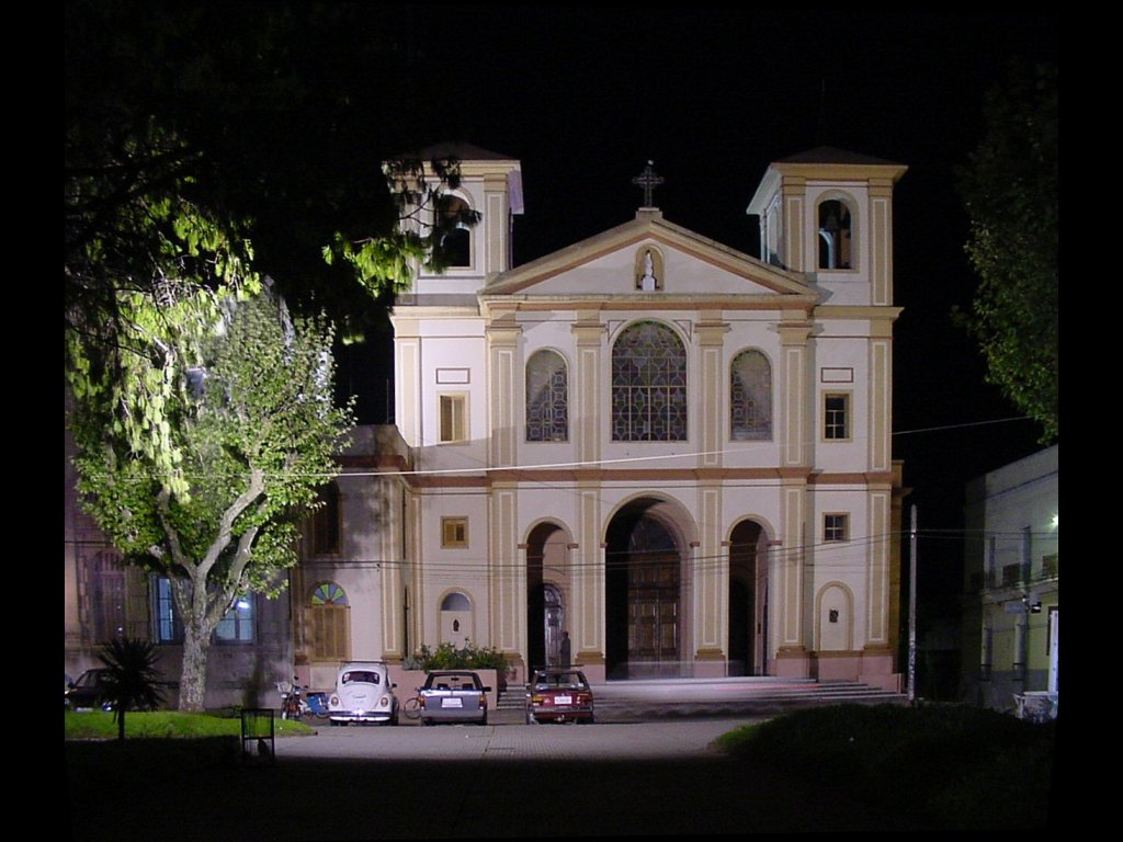 Iglesia Catedral de Nuestra Señora del Pilar.. Ubicada en el departamento de Cerro Largo